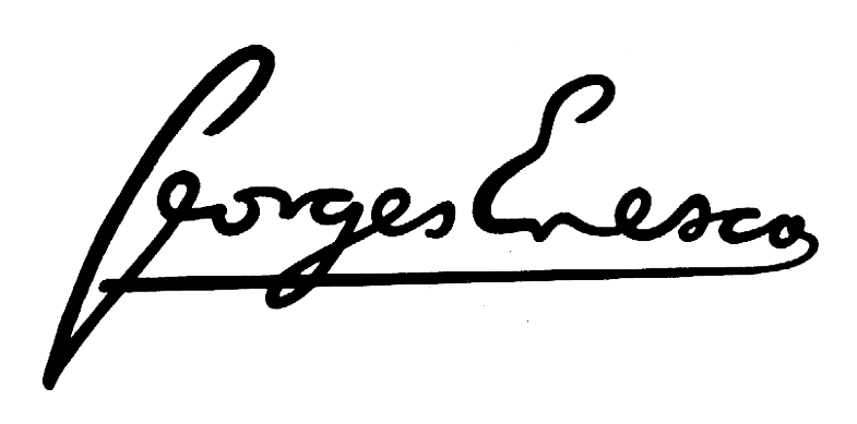 Signature de Goerges Enesco